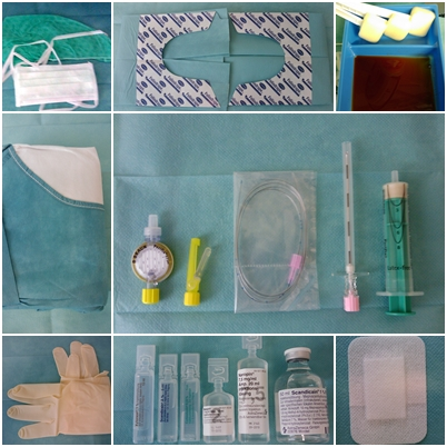 Peridural anesteziya üçün istifadə olunan ləvazimatlar: tibbi mask və baş örtüyü, xalat, əlcək, izolyasiya materialı, yerli keyləşdiricilər, peridural kateter dəsti: Tuh (Tuohy) iynəsi və kateter, adaptor, bakteriyalara qarşı filtr, "müqavimətin itməsi" ösulunu tətbiq etmək üçün şpris